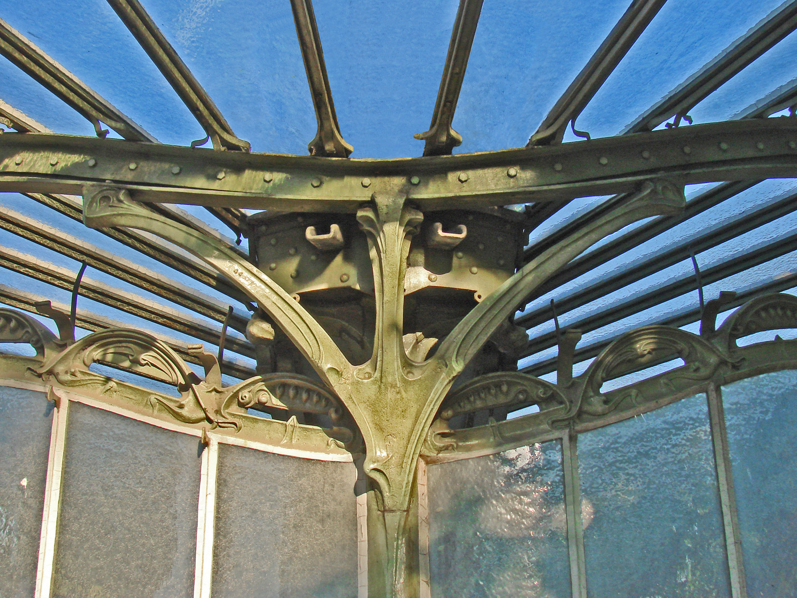 Détail de la partie arrière de la station art nouveau de la porte Dauphine (Hector Guimard) PORTE DAUPHINE - Place du Paraguay Station ouverte en 1900. C'est le plus bel édicule conçu par Hector Guimard (1867-1942 ) à Paris.